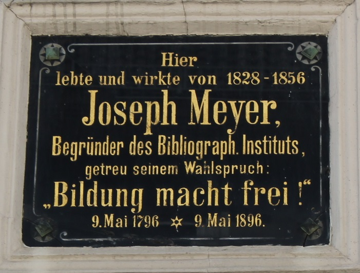 Gedenktafel für Joseph Meyer am ehemaligen Verlagssitz des Bibliographischen Instituts in Hildburghausen (Obere Marktstraße 44, 98646 Hildburghausen)